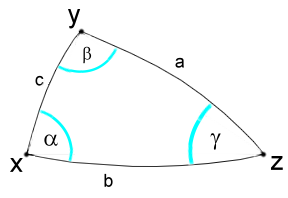 ilustracja do dowodów tw. cos i sin